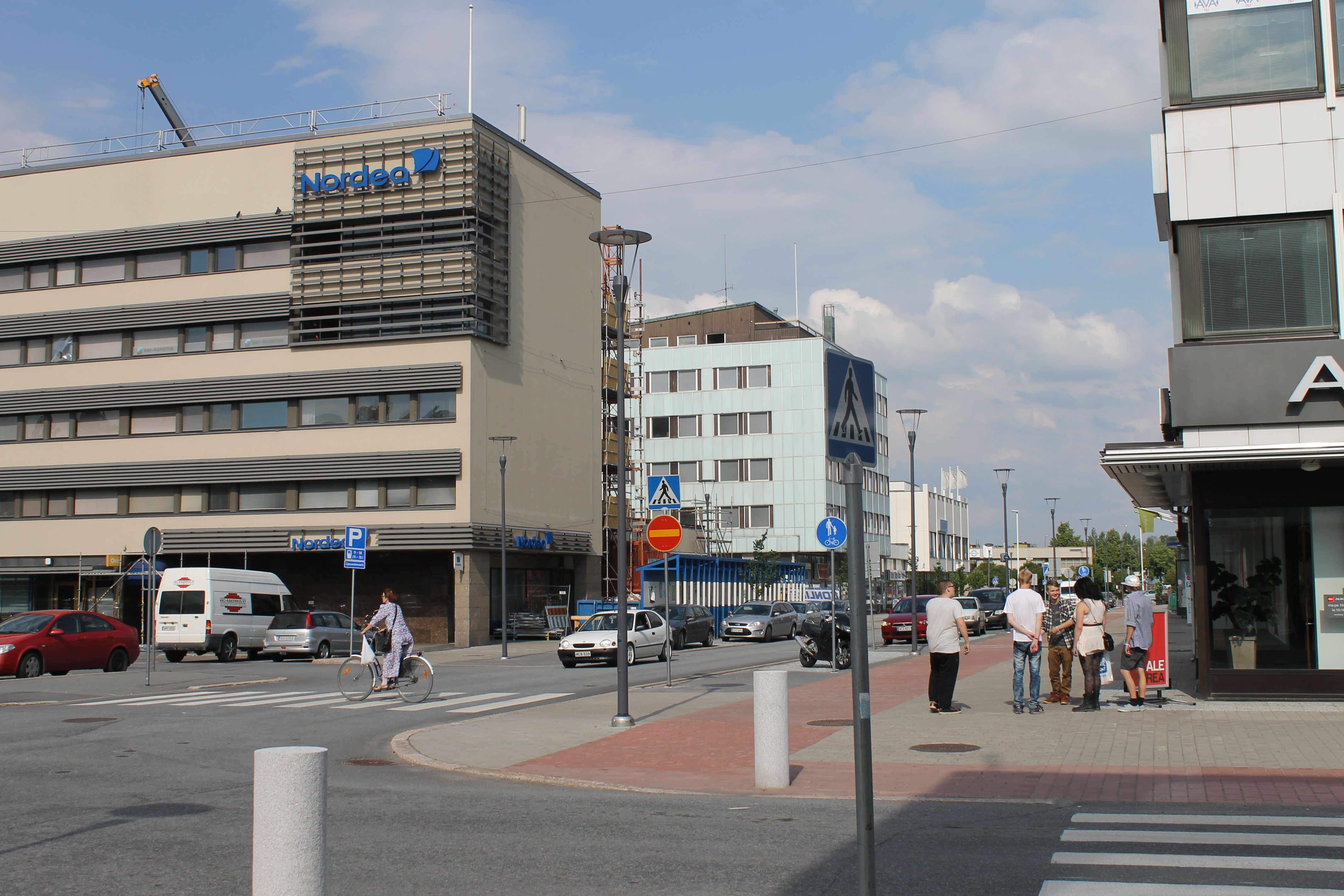 Kalevankatu pohjoiseen päin